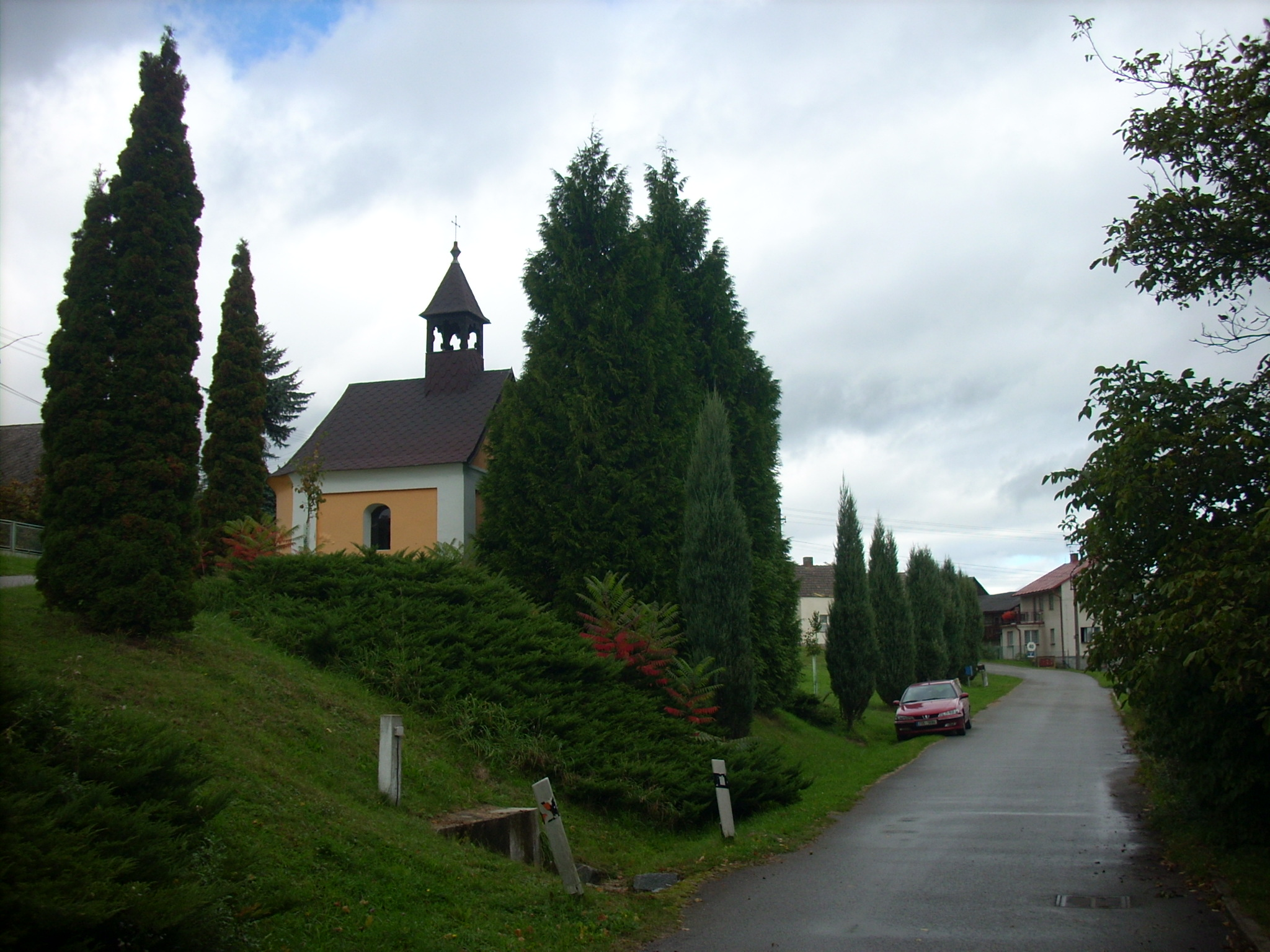 Kaple (Vicmanov), náves, Vicmanov